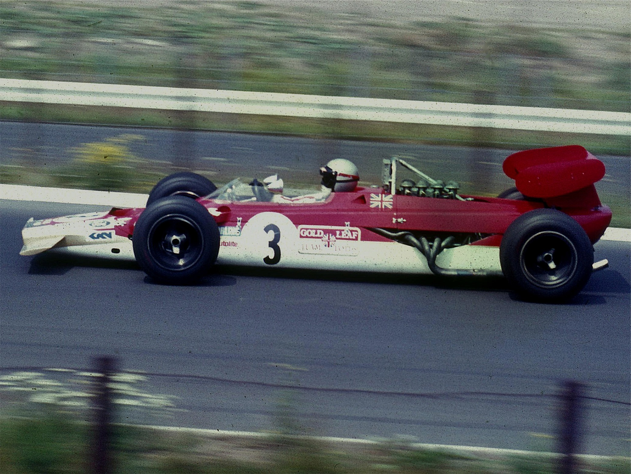 Mario Andretti im Lotus 63 mit Allradantrieb beim Training zum GP von Deutschland auf dem Nürburgring, eingangs Südkehre